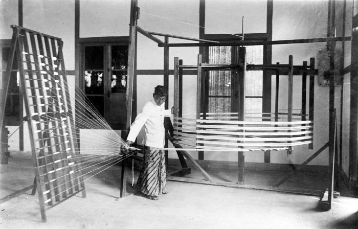 Repronegatief. Handscheermolen van de Textielinrichting Bandoeng